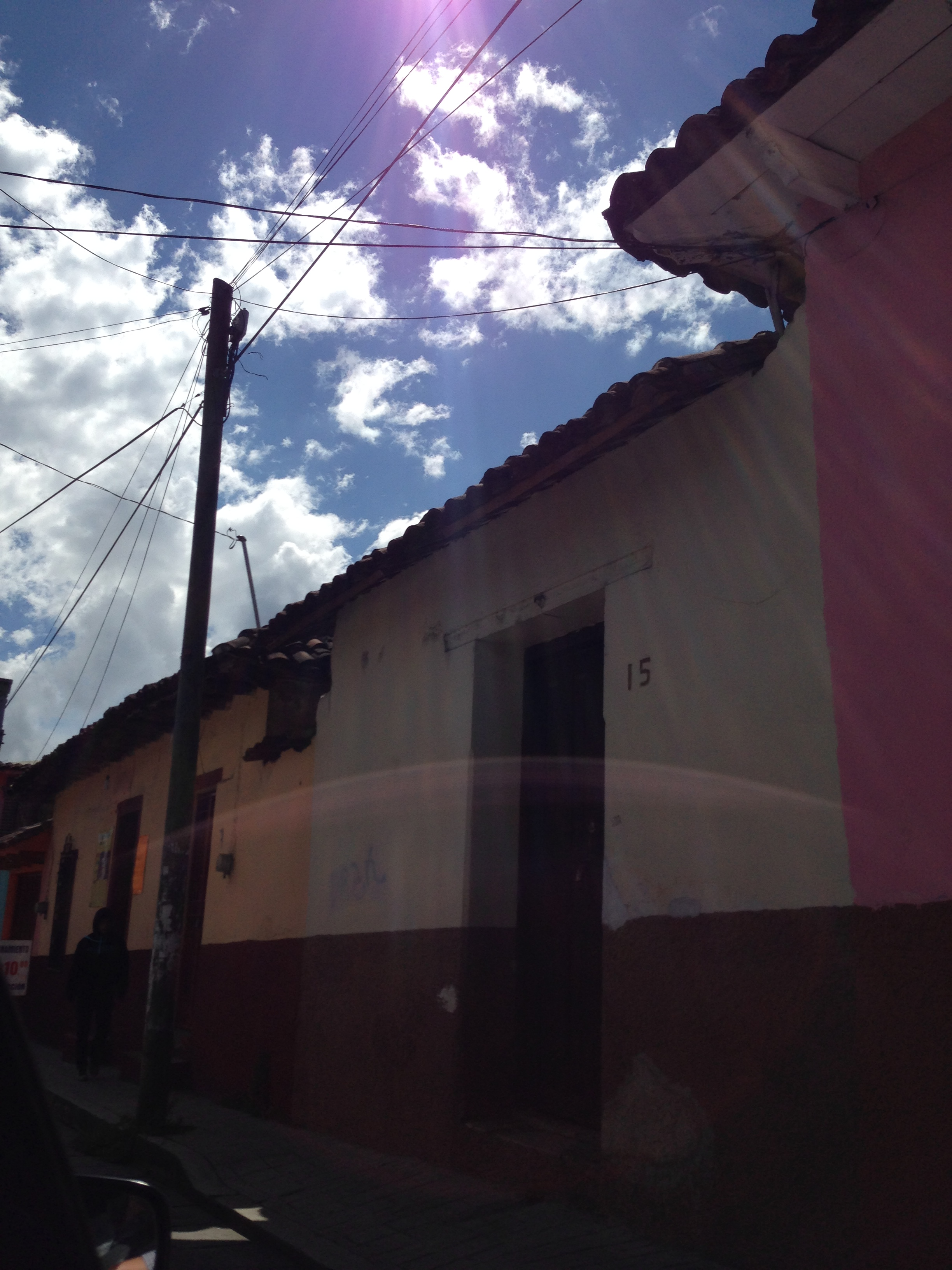 Puebleando en Chiapas